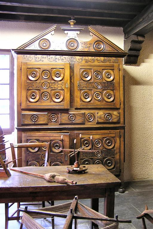 armoire du 19eme visible dans le musée pyrénéen du château fort de lourdes